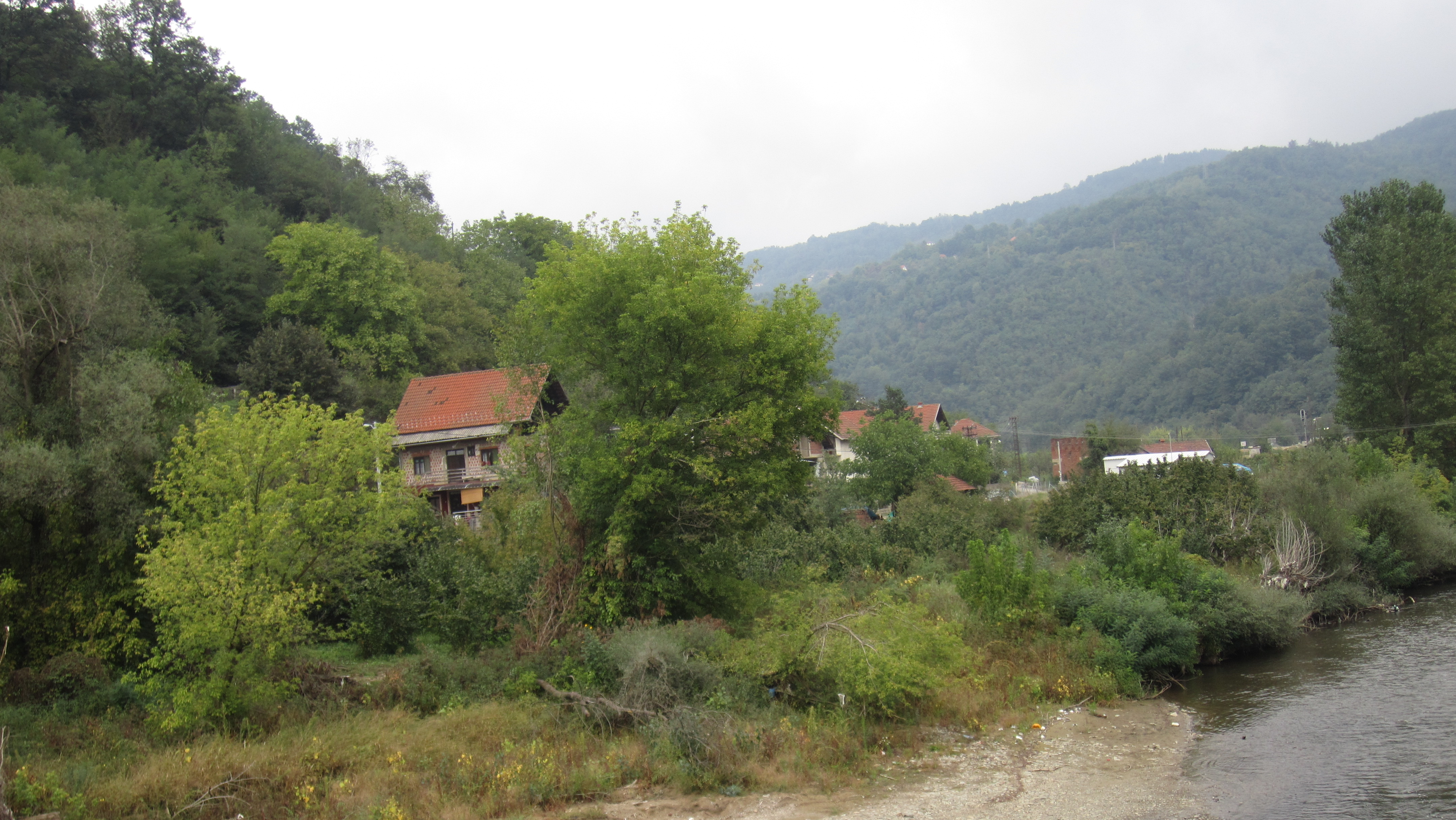 Srpski (latinica): Koraćevac, Leskovac